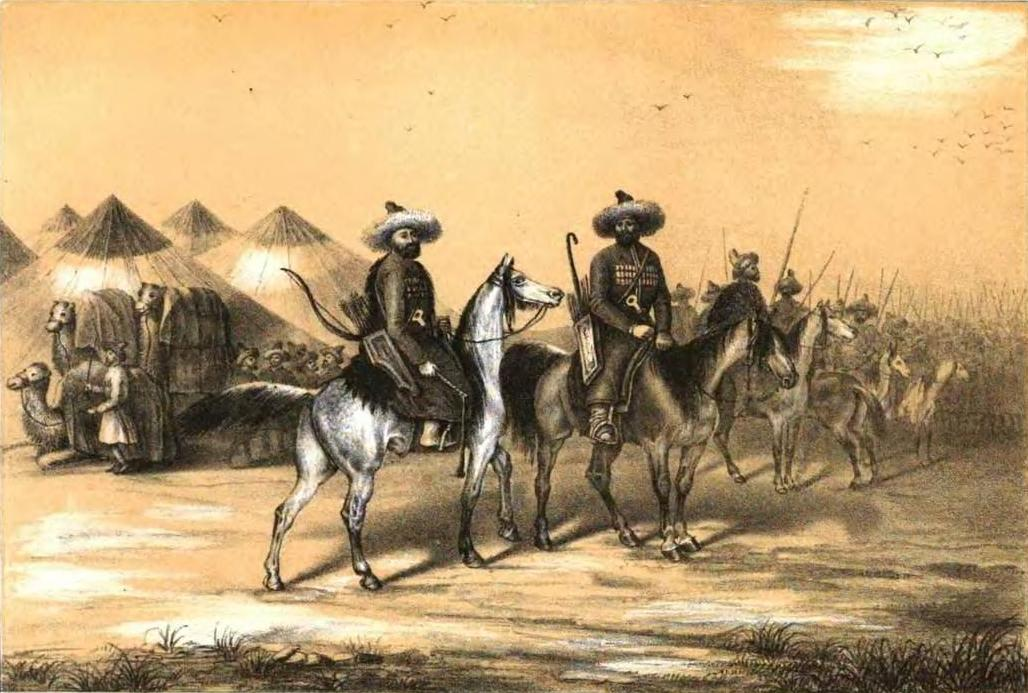 Gustaw Zieliński - Kirgiz grafika